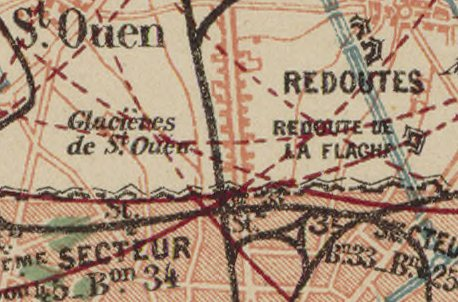 Redoute de la Flache, 1870, sur la plaine d'Aubervilliers. Carte de l'investissement de Paris. Domaine public. Gallica BNF.